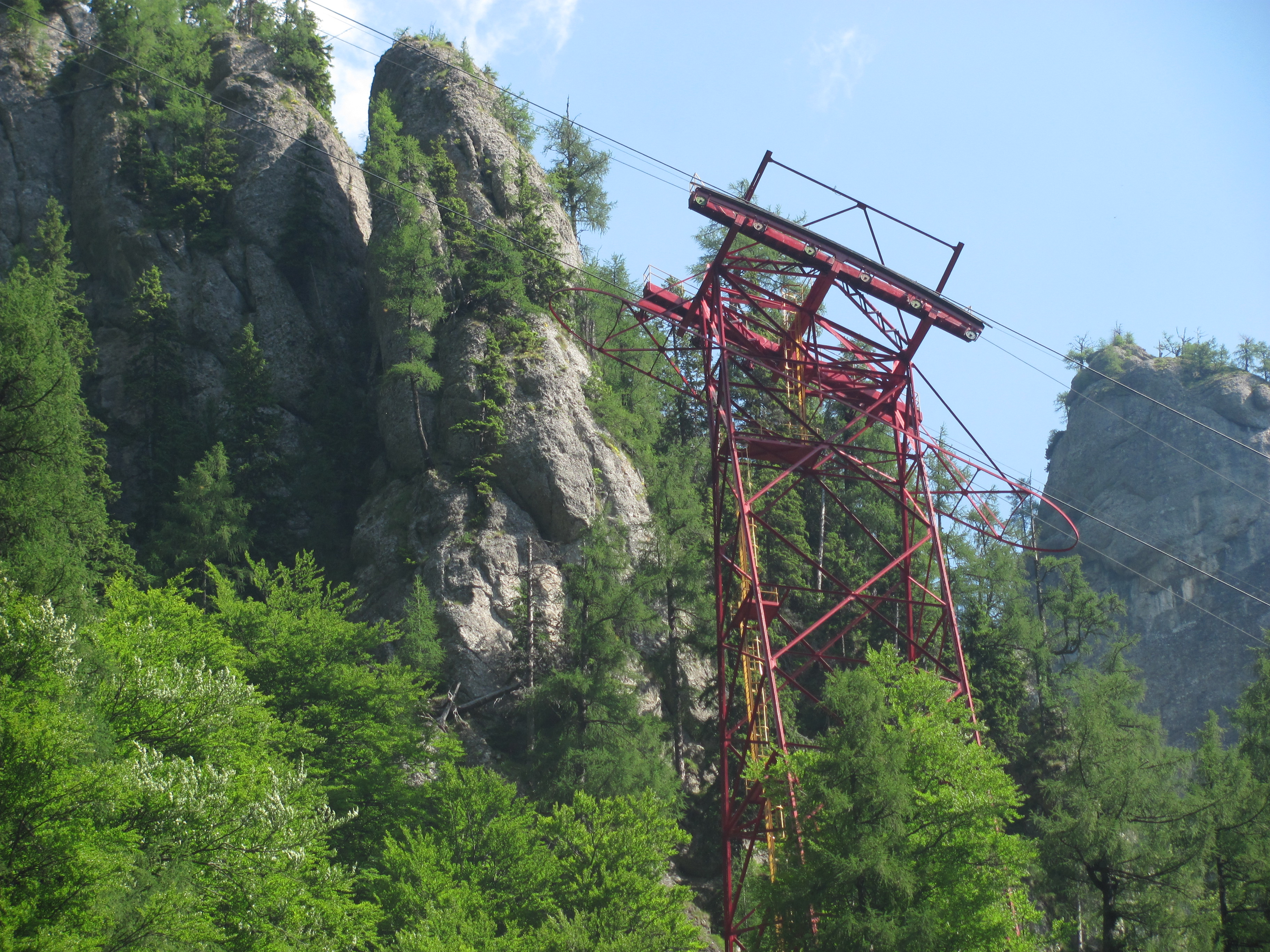 Stâlpul al doilea al telecabinei Busteni-Babele (facut la data de 9 Iul 2011)